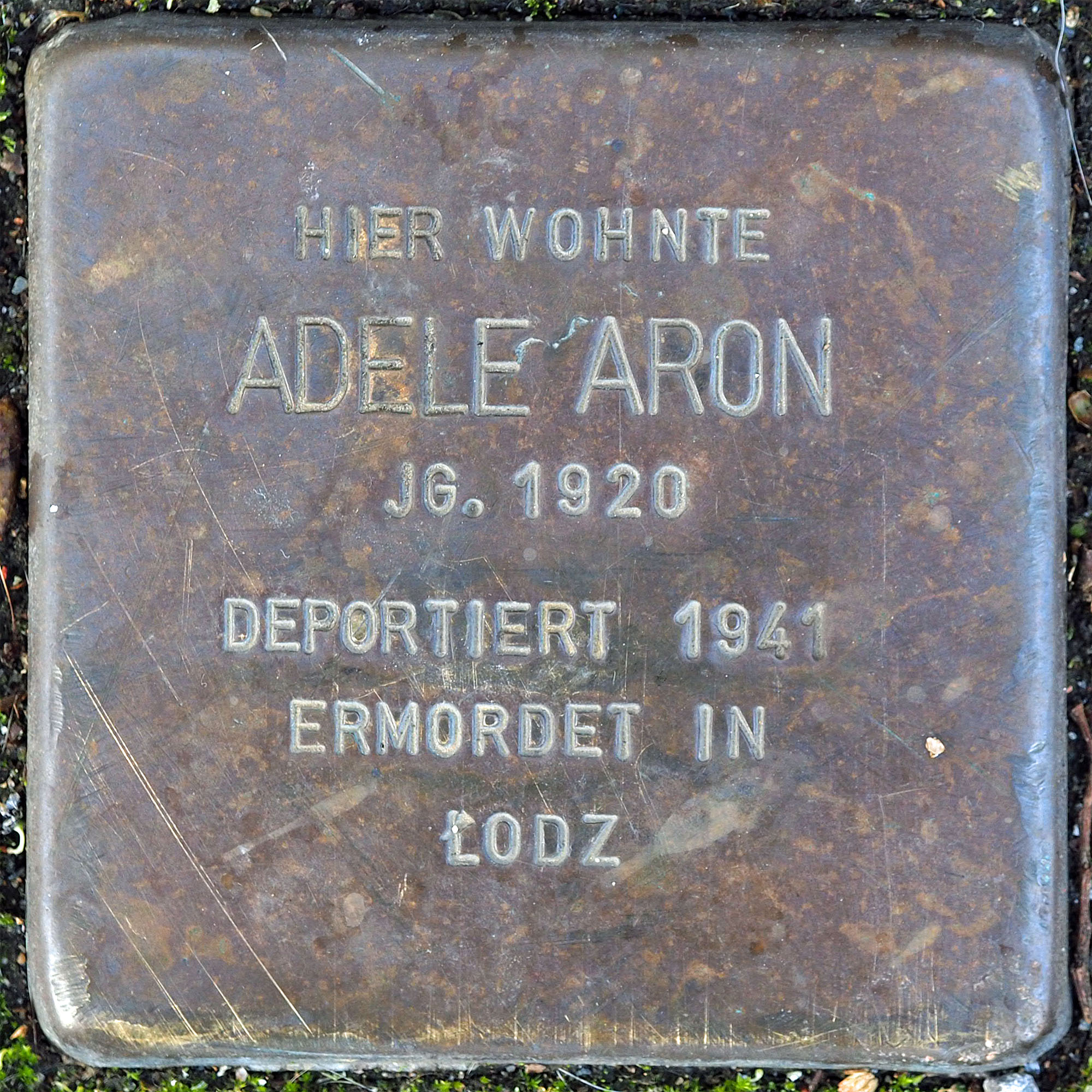 Stolpersteine MG: Aron, Adele